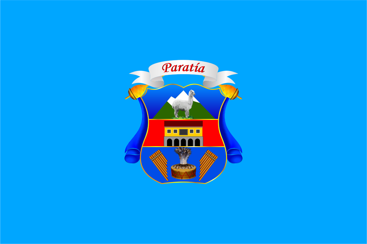 Bandera del Distrito de Paratía - Provincia de Lampa - Región Puno